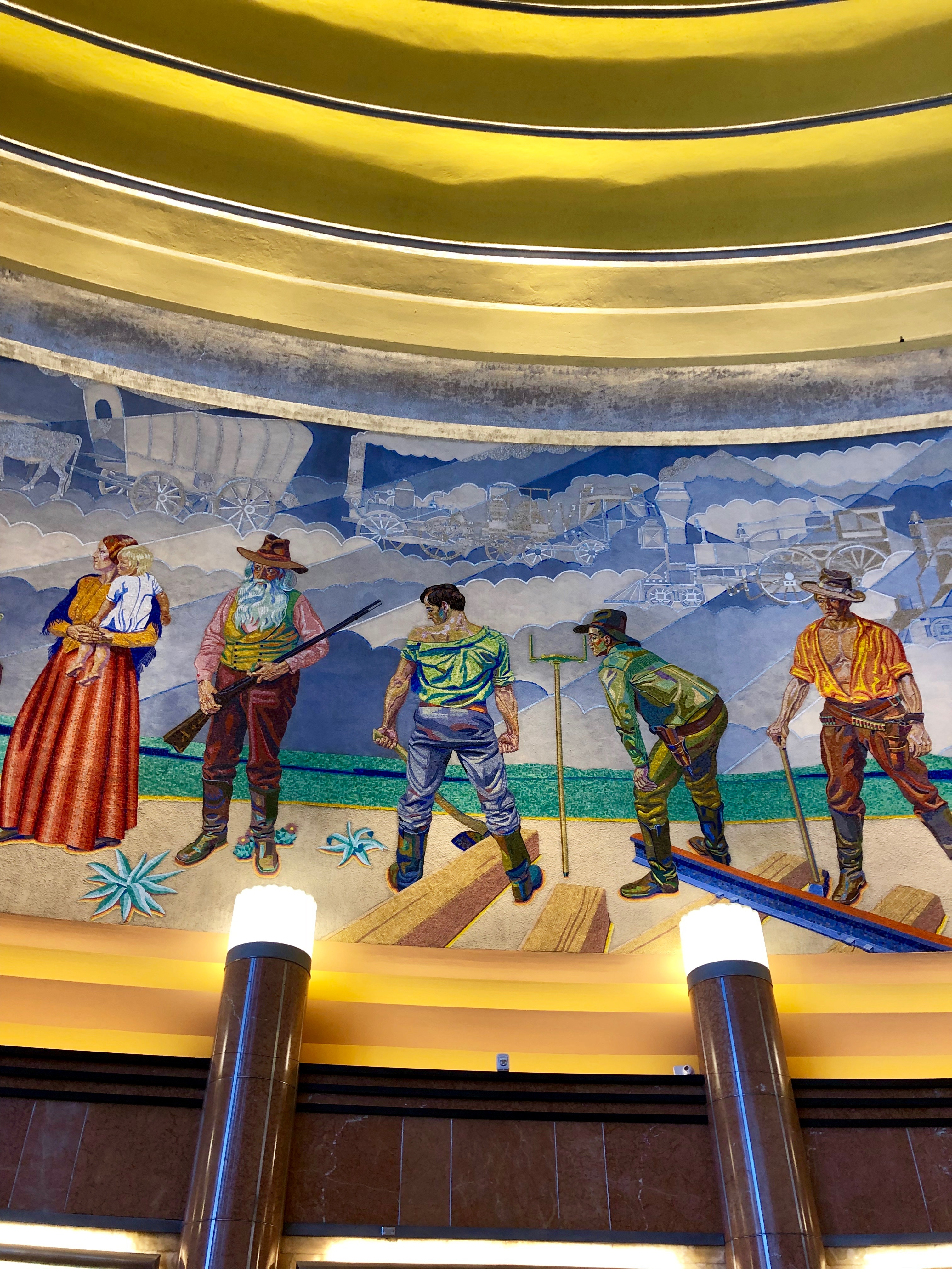 Rotunda Mosaics, Cincinnati Union Terminal, Queensgate, Cincinnati, OH